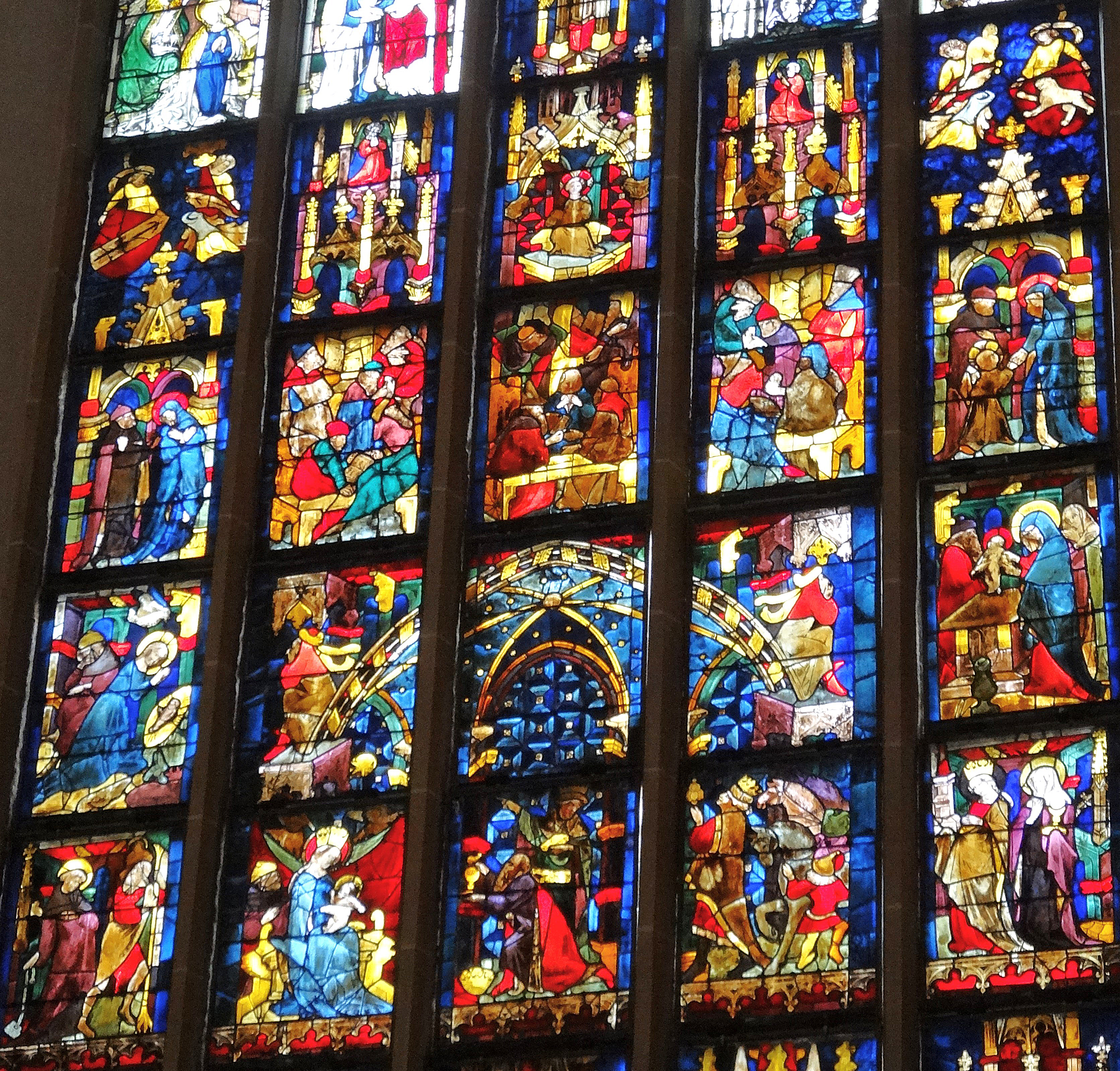 Frauenkirche (München), gotisches Buntglasfenster.